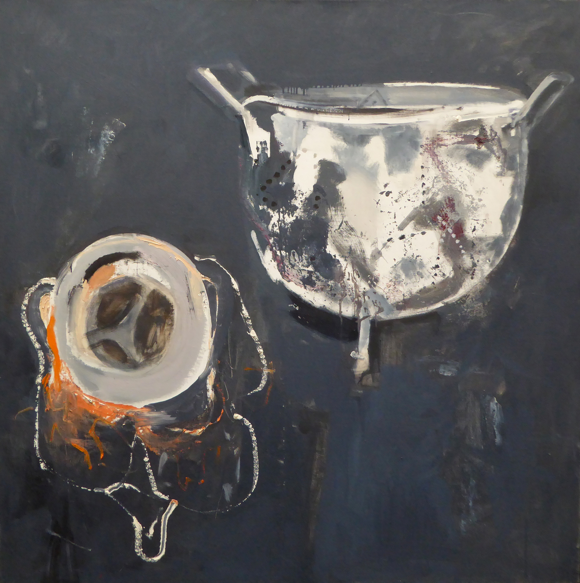 זכרונות מוקדמים - 1990